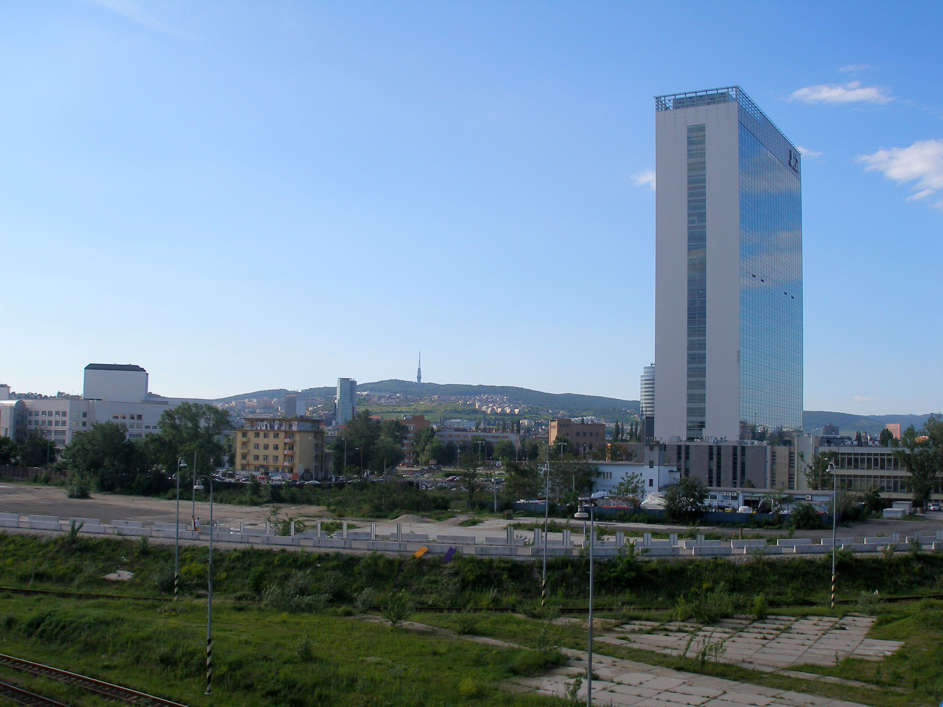 Bratislava Pribinova ulica.